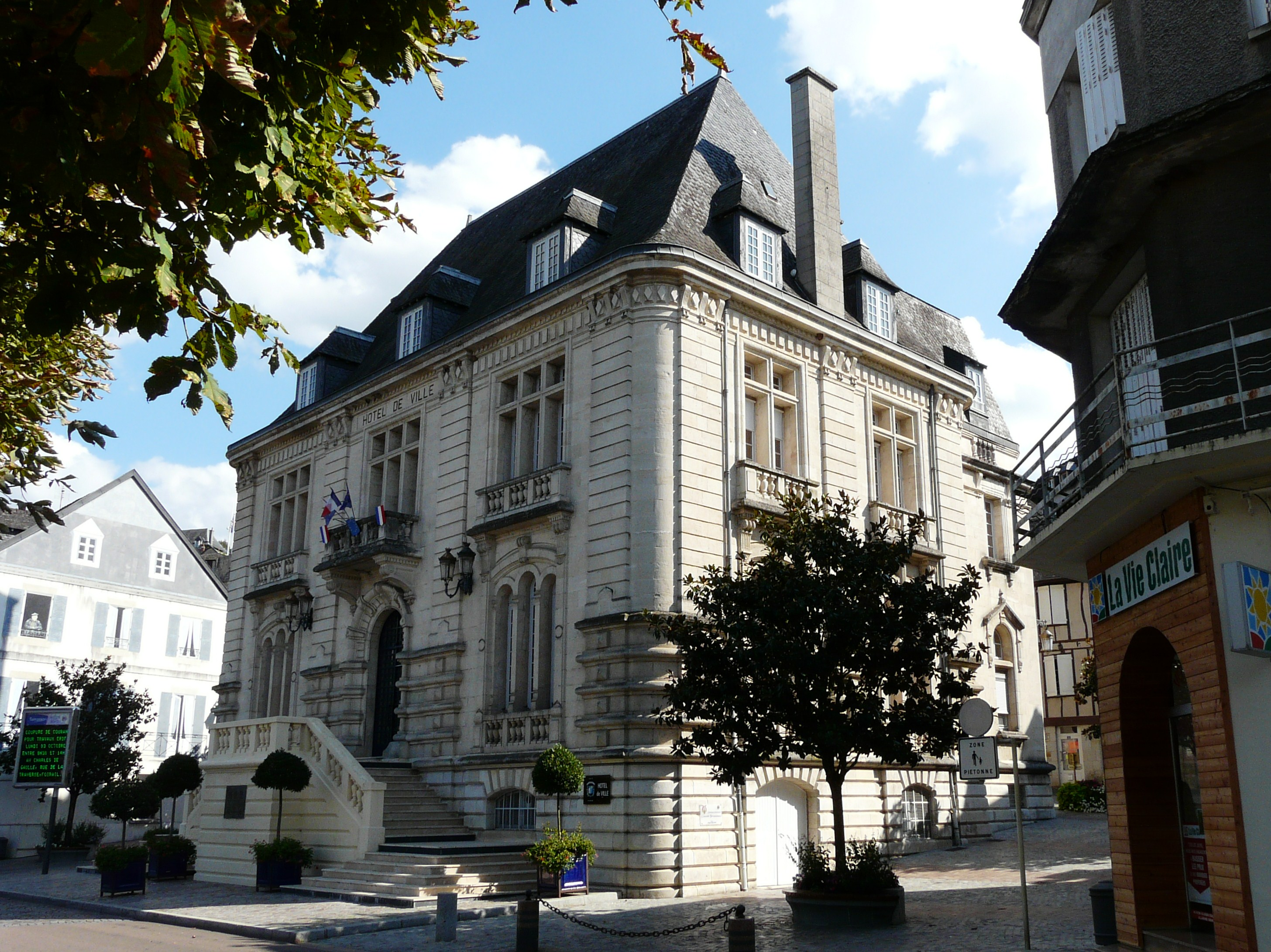 L'hôtel de ville de Terrasson-Lavilledieu, Dordogne, France.